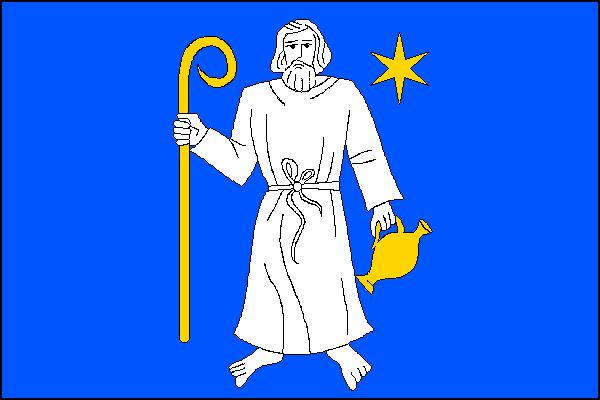 vlajka obce Luká